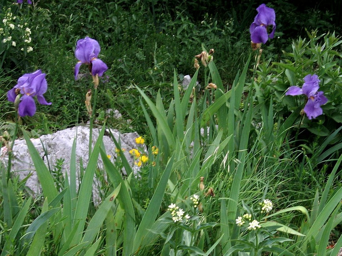 Južnoalpska perunika na Breginjskem Stolu, Starijski vrh.